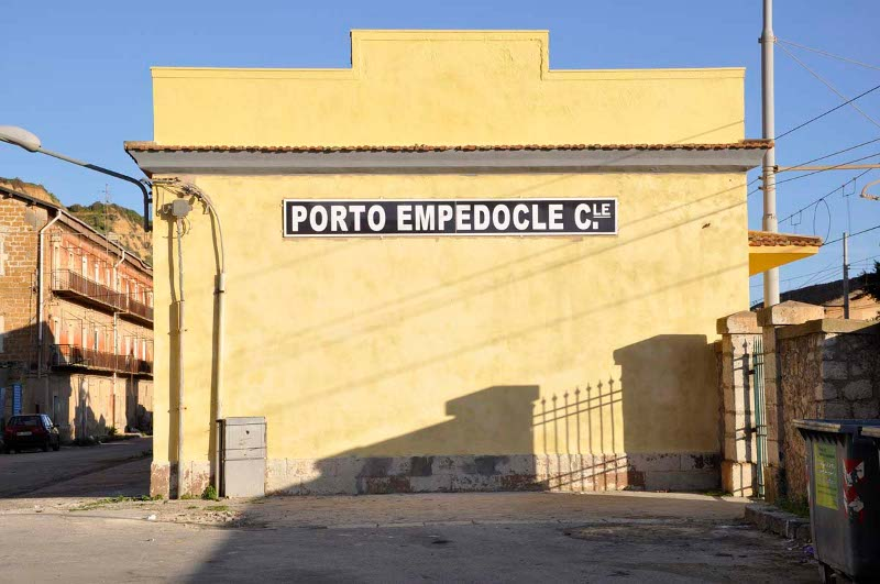 Stazione di Porto Empedocle C.le - ingresso via Lincoln - foto di John Copsey - Ferrovie Kaos